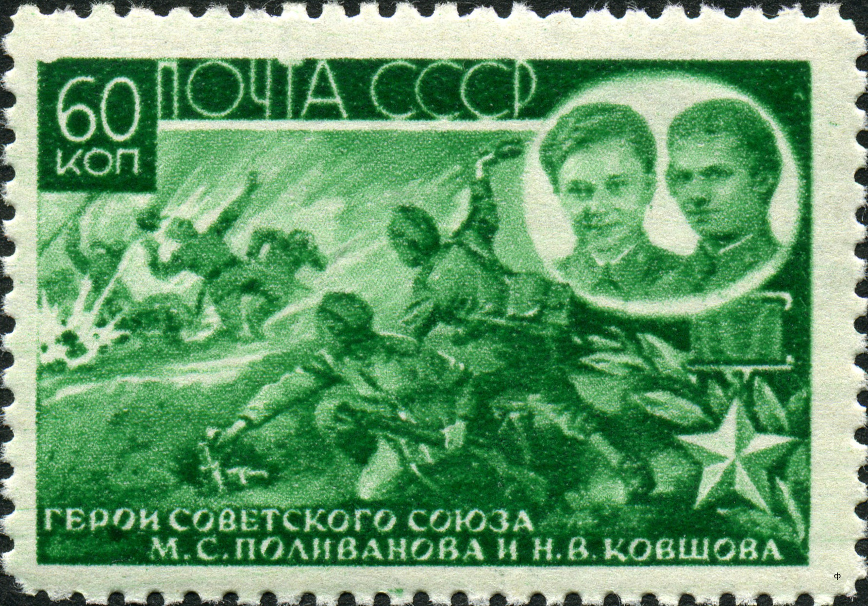 Почтовая марка СССР - Поливанова и Ковшова - Герои Советского Союза